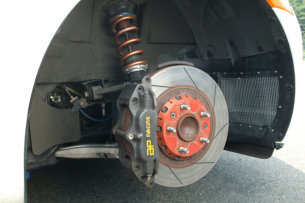 AP Racing disk-brake.